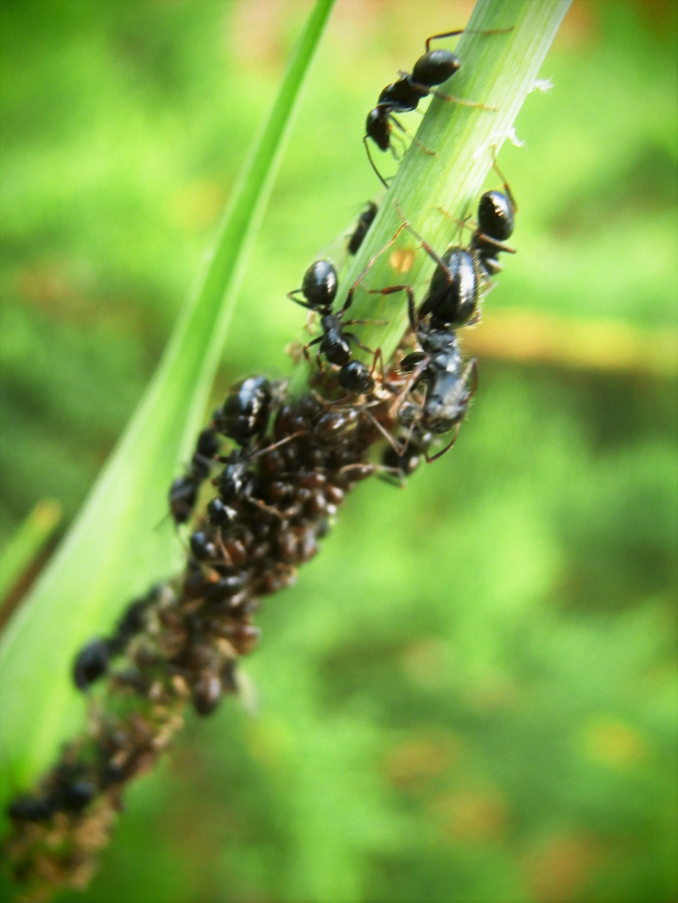 Fotografija pristigla na foto-konkurs "Divlji Viki Parkovi 2017". Živi svet gradskih parkova u Nišu.